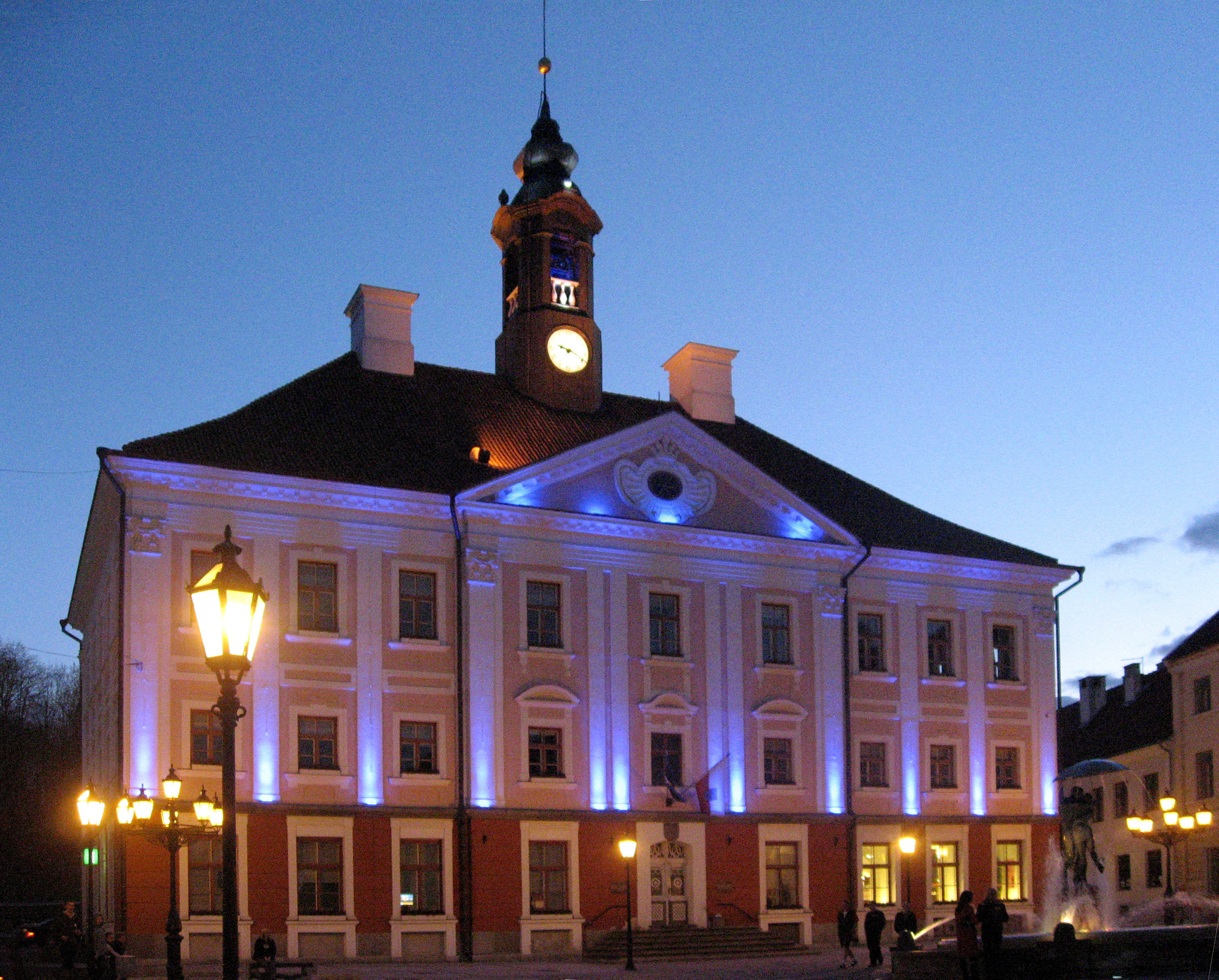 Tartu, osvětlená radnice